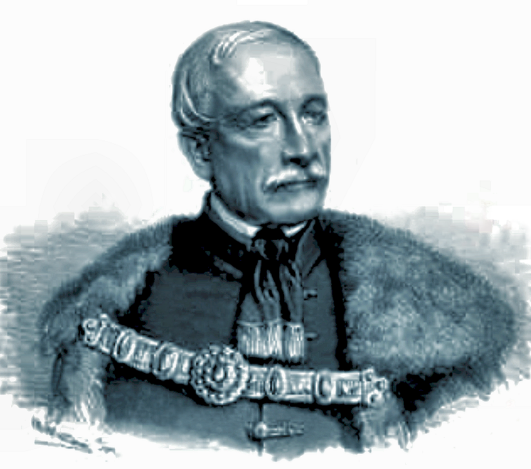 Carl Graf Zay von Csömör nach 1860